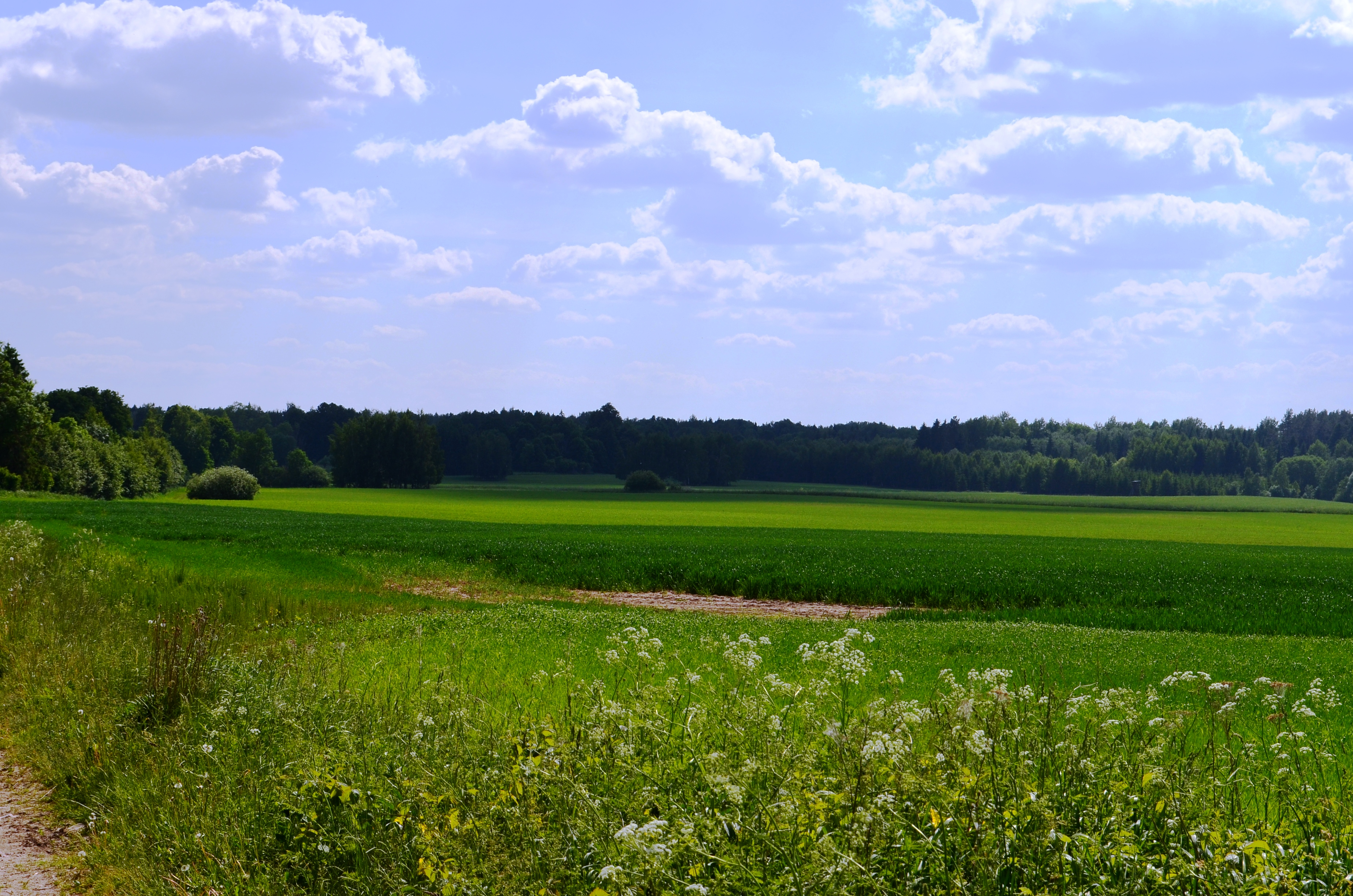 Žagarės giria ties Šarūnais, Joniškio raj.